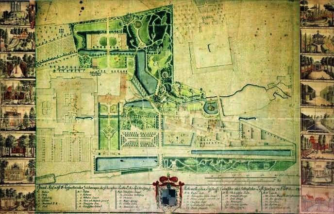 Historyczny plan Parku Oliwskiego z 1792 r.